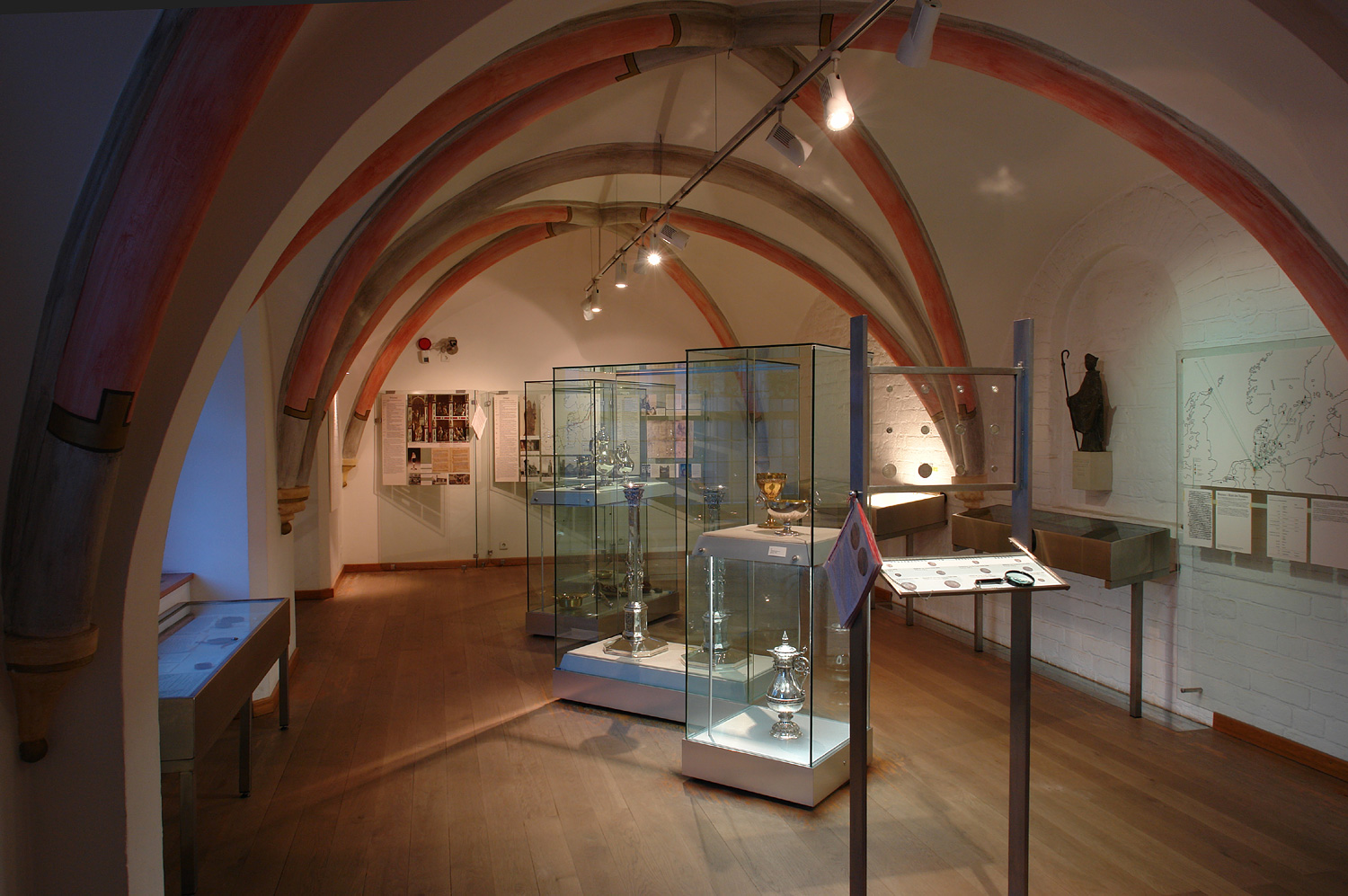 Bremer Dom-Museum: Der Silberraum. Themenbereiche Bistum Bremen und historisches Altarsilber